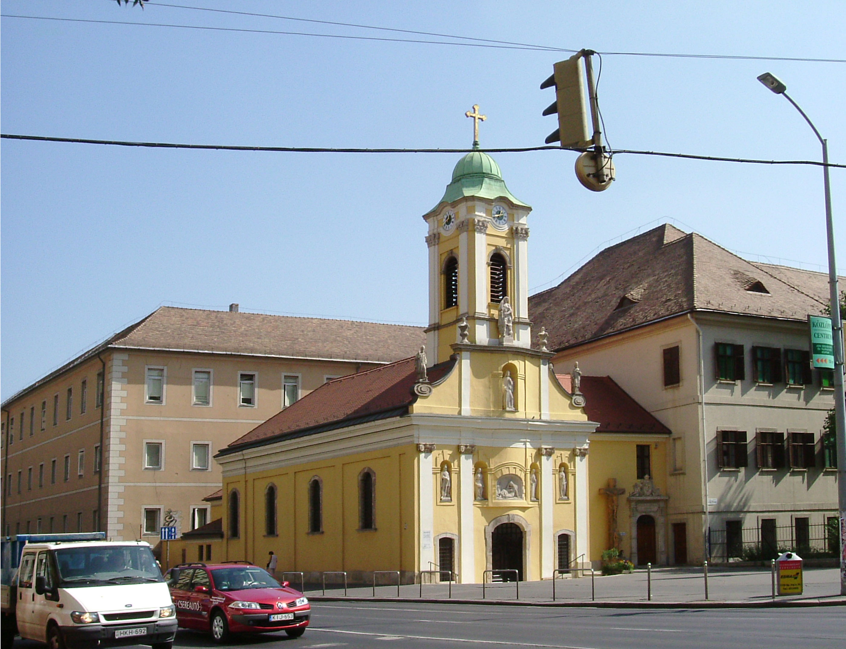 St.Roch Chapel and Hospital. Budapest-Hungary. (Hungarian: Rókus-kápolna és kórház)